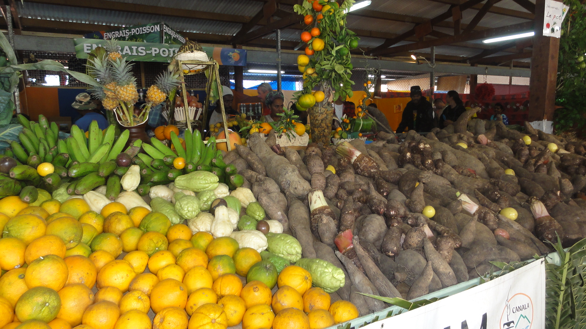 Produits alimentaires